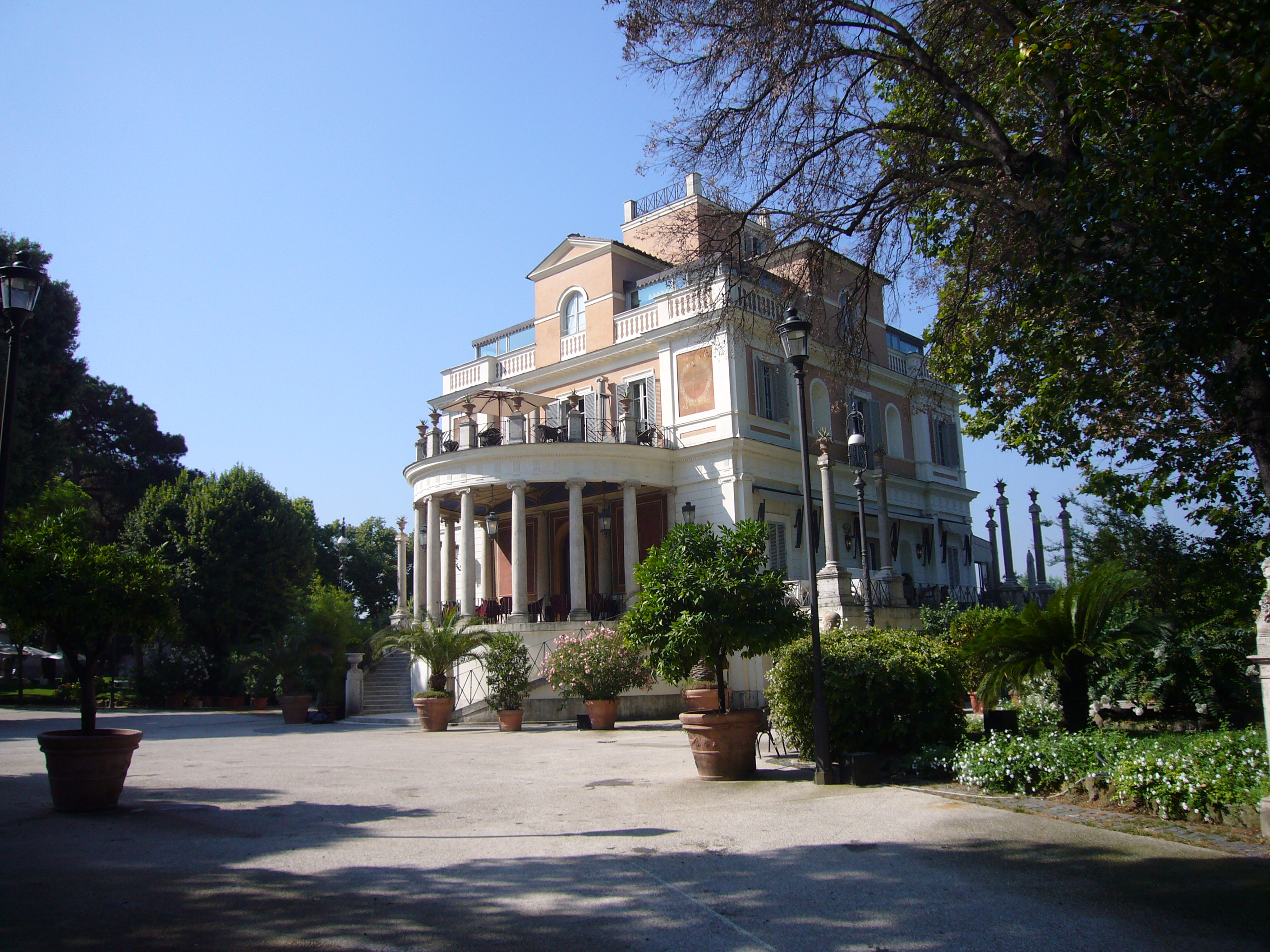 Roma, Casina Valadier al Pincio, ingresso su piazzale Bucarest